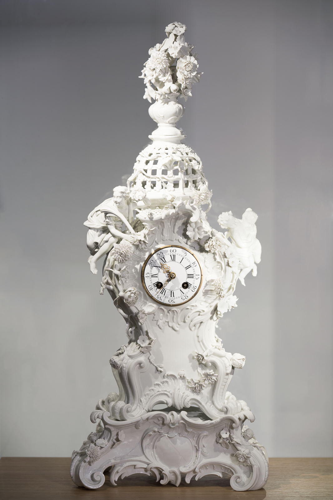 Uhrgehäuse, um 1760